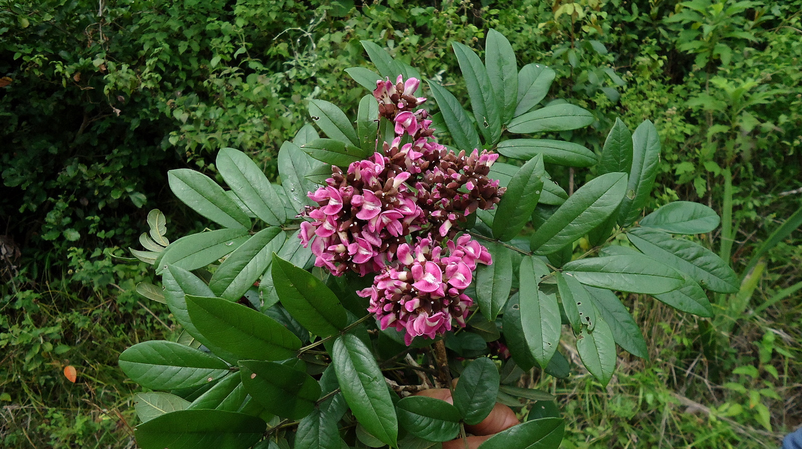 Andira fraxinifolia, Bahia, Brazil